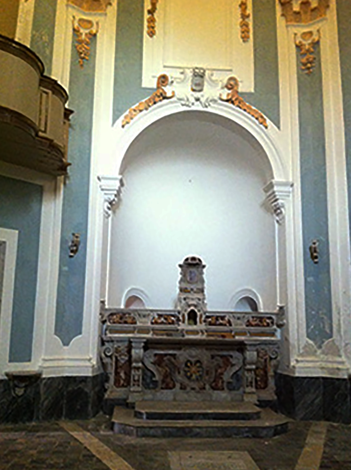 Altare Monte dei Morti di Salerno